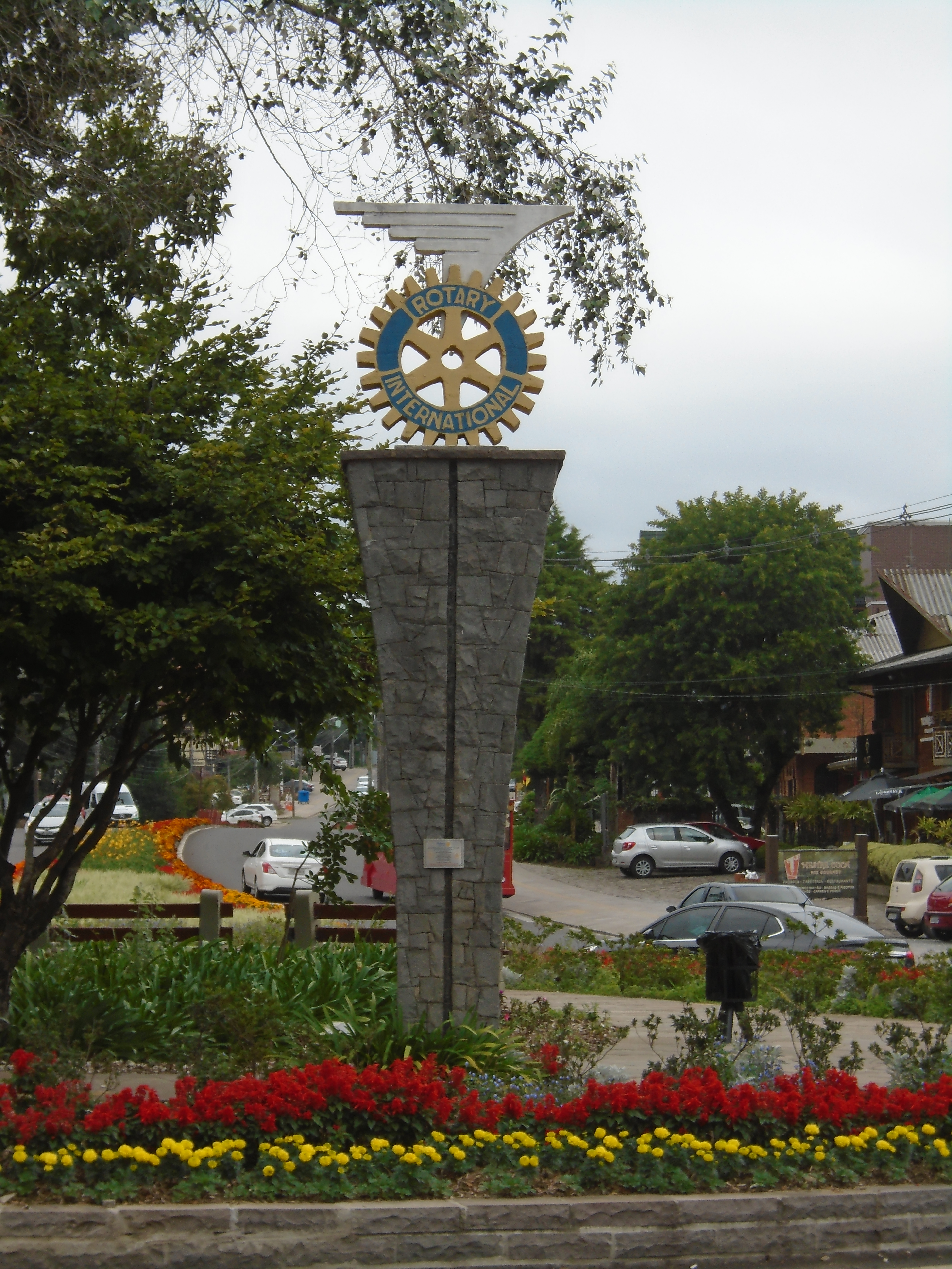 Praça do Rotary (Gramado, Brasil)